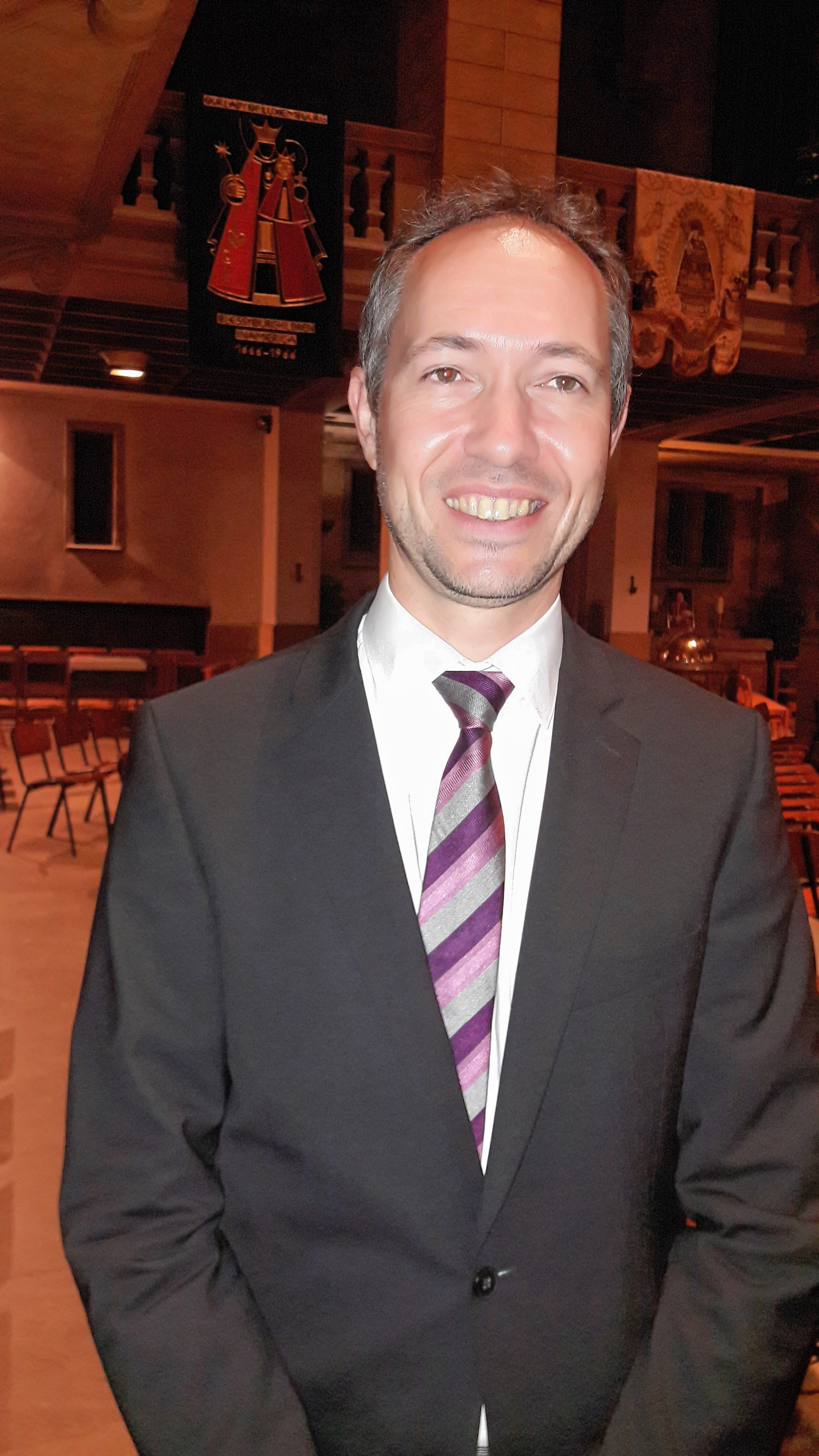 Paul Breisch, December 2007